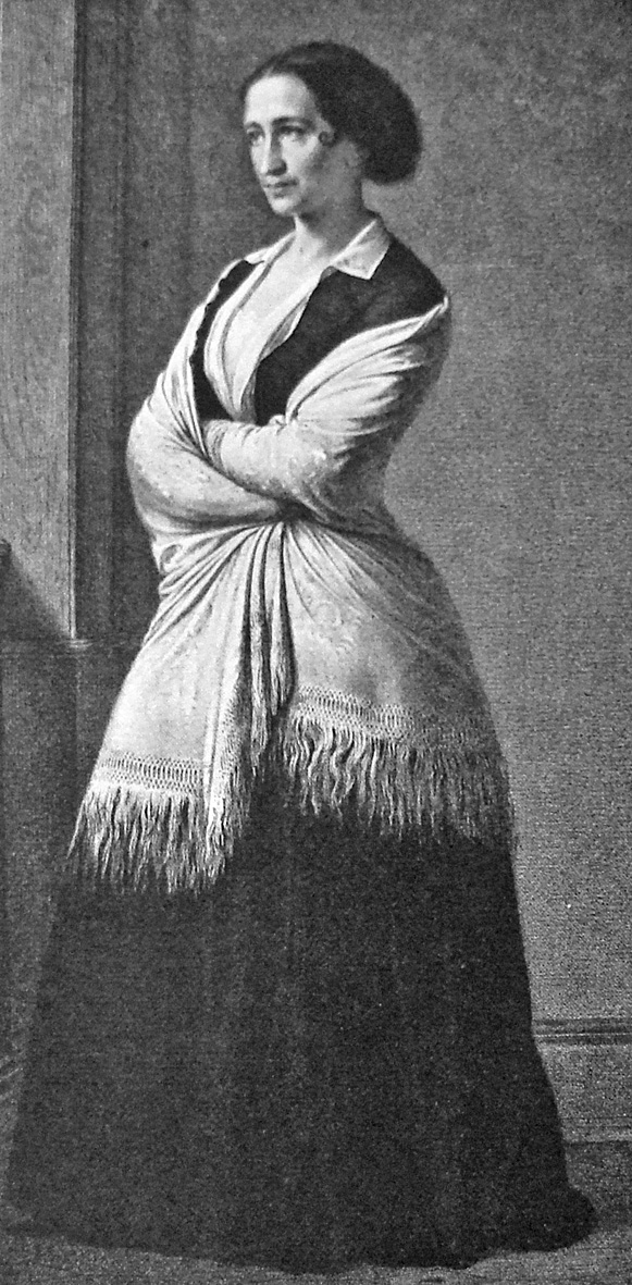 Johanne Luise Heiberg, født Pätges (22. november 1812– 21. december 1890). Dansk skuespillerinde gift med Johan Ludvig Heiberg. Hun var sin tids førende skuespillerinde på Det kongelige Teater.